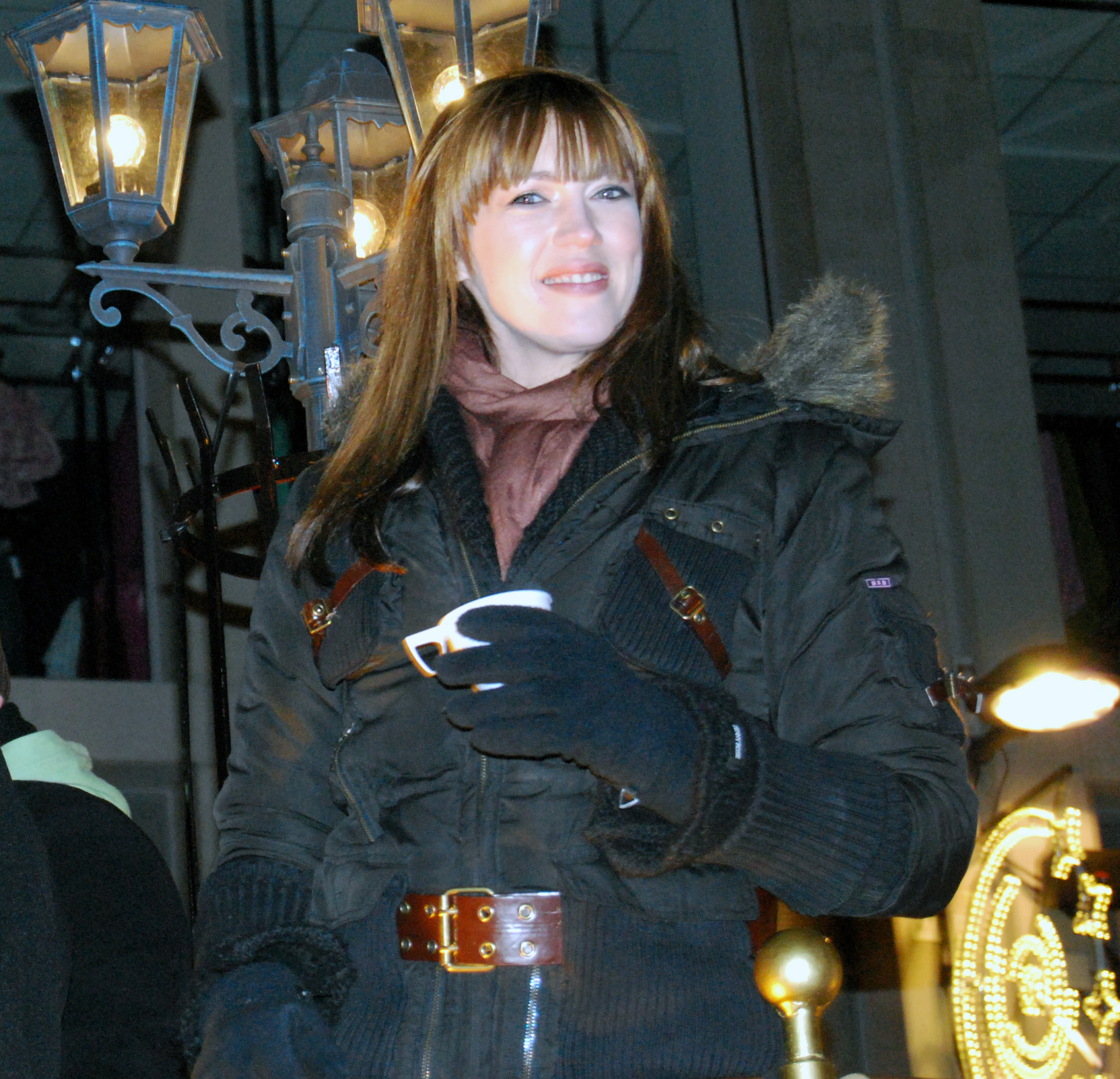 Kelly Pfaff tijdens VTM-kerstparade in Genk, 2008